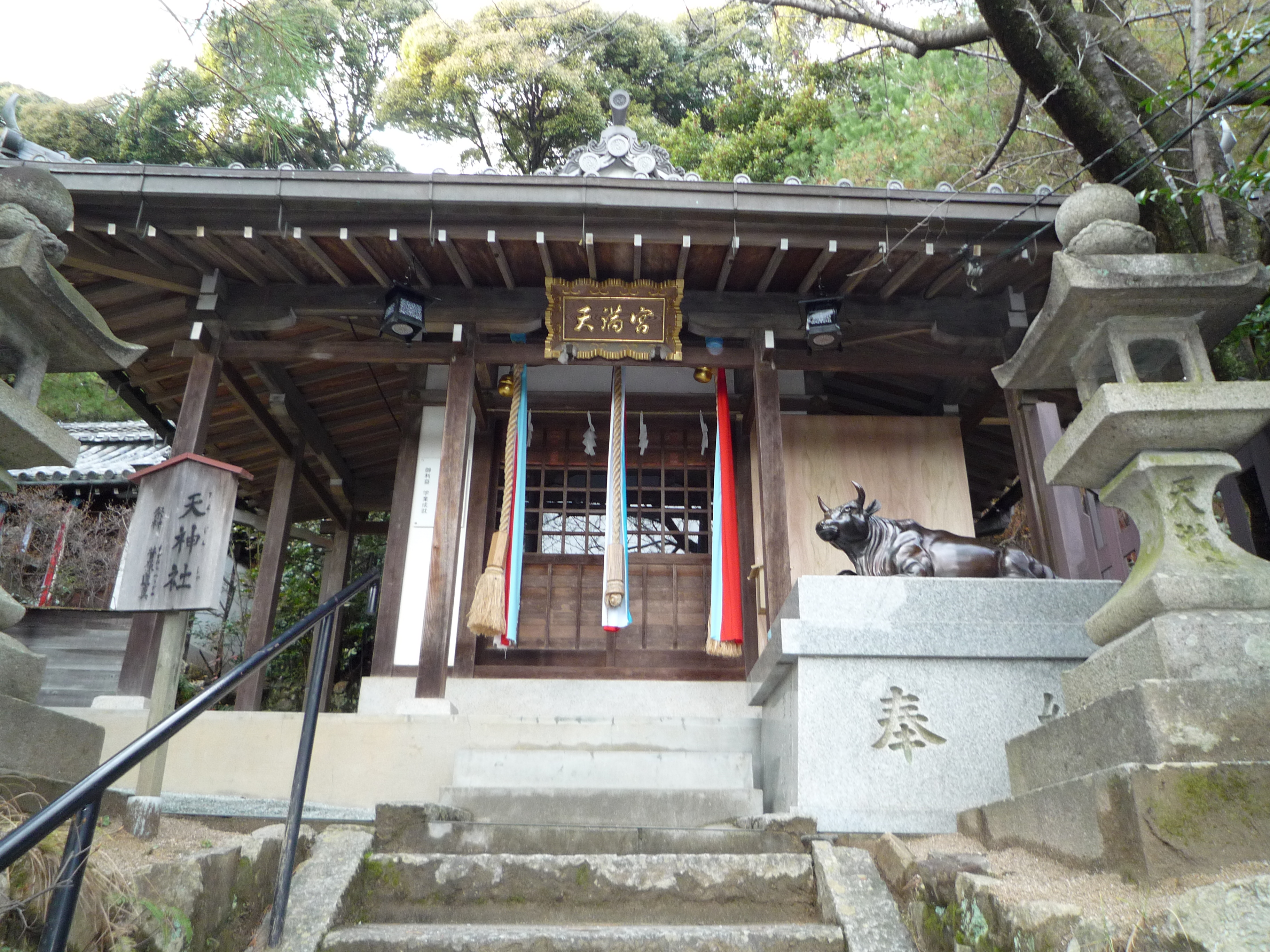 春日神社天神社